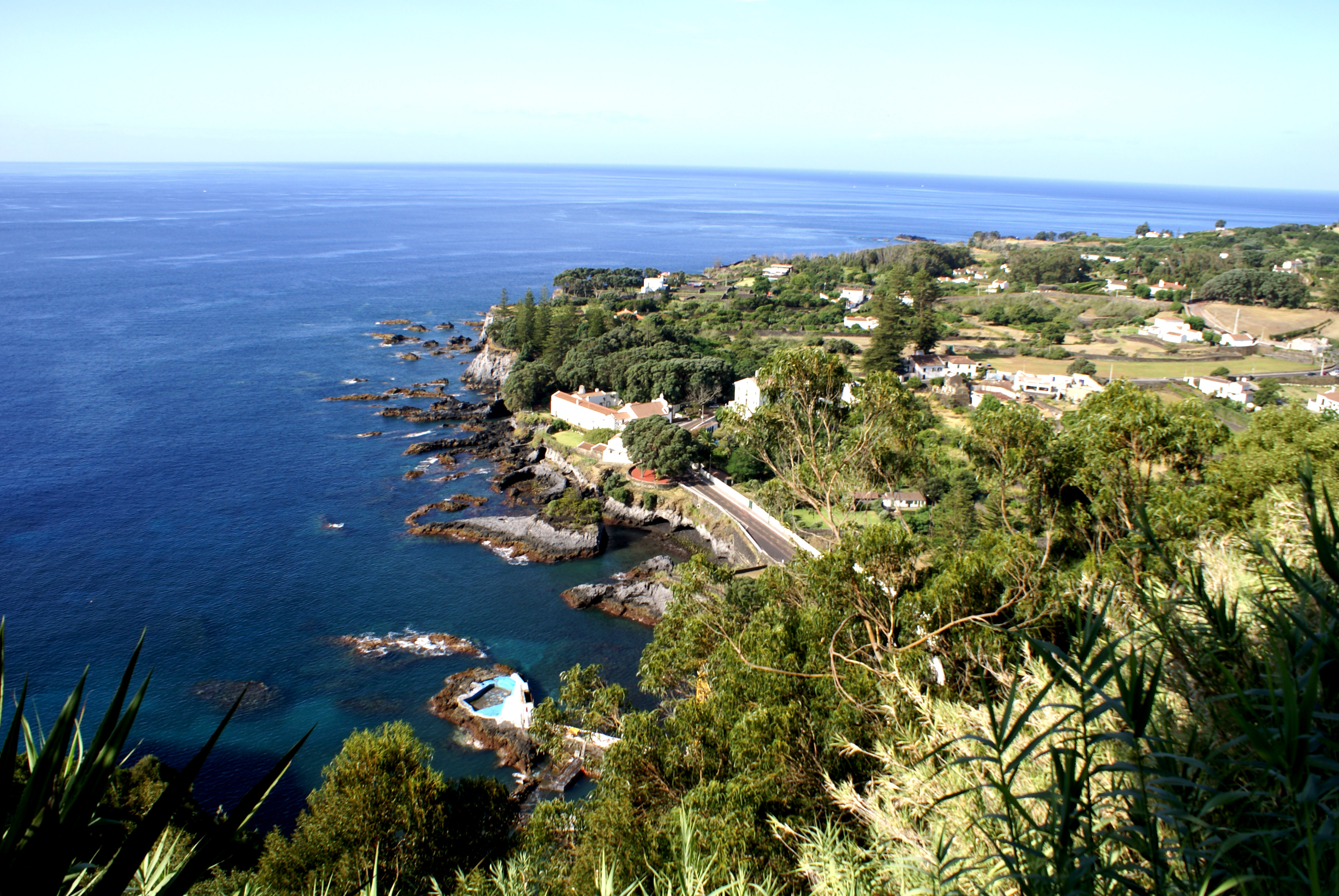 Caloura vista do Miradouro do Pisão, Lagoa, ilha de São Miguel, Açores